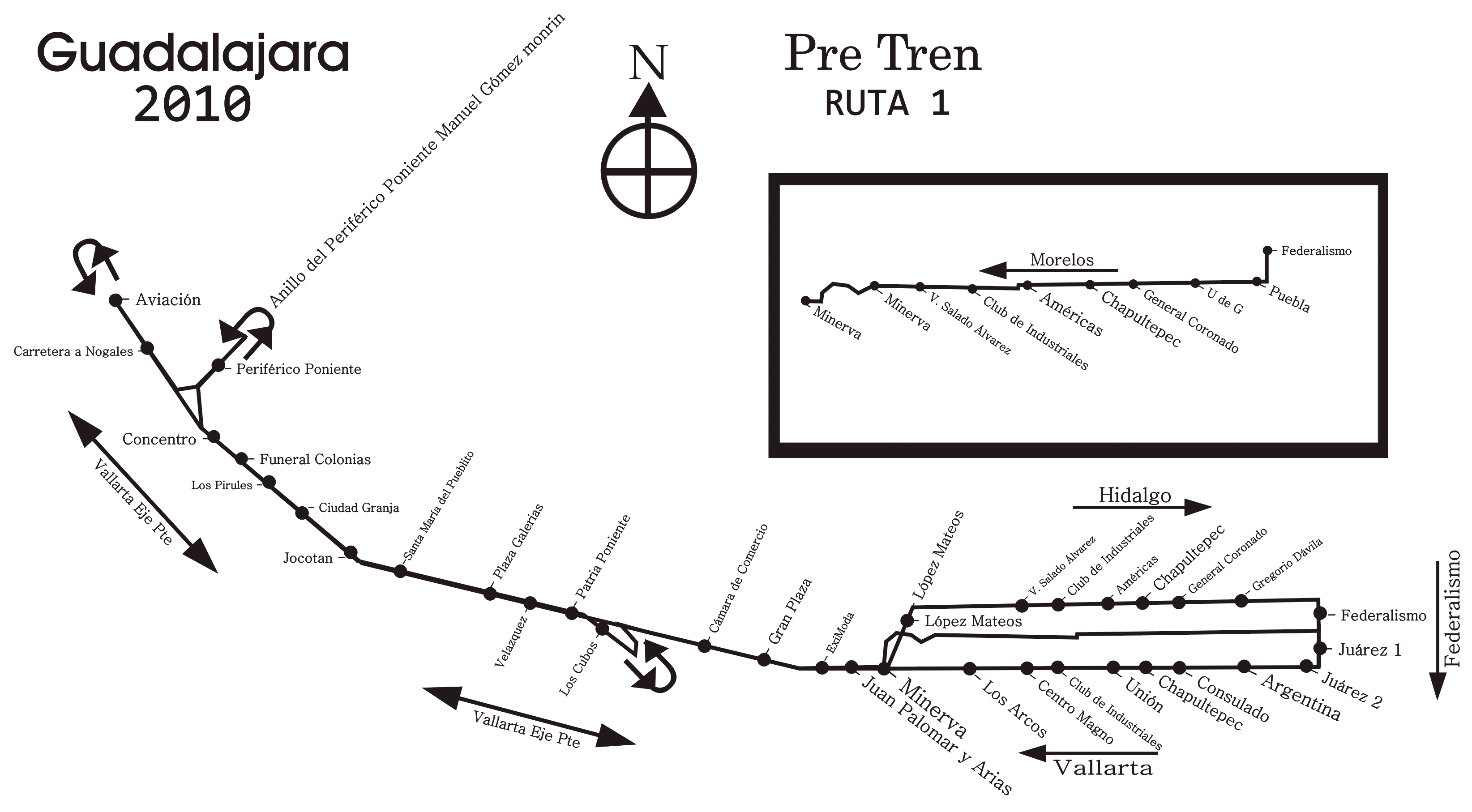 Mapa de la Ruta 1 del Pre-Tren de Guadalajara Actualizada